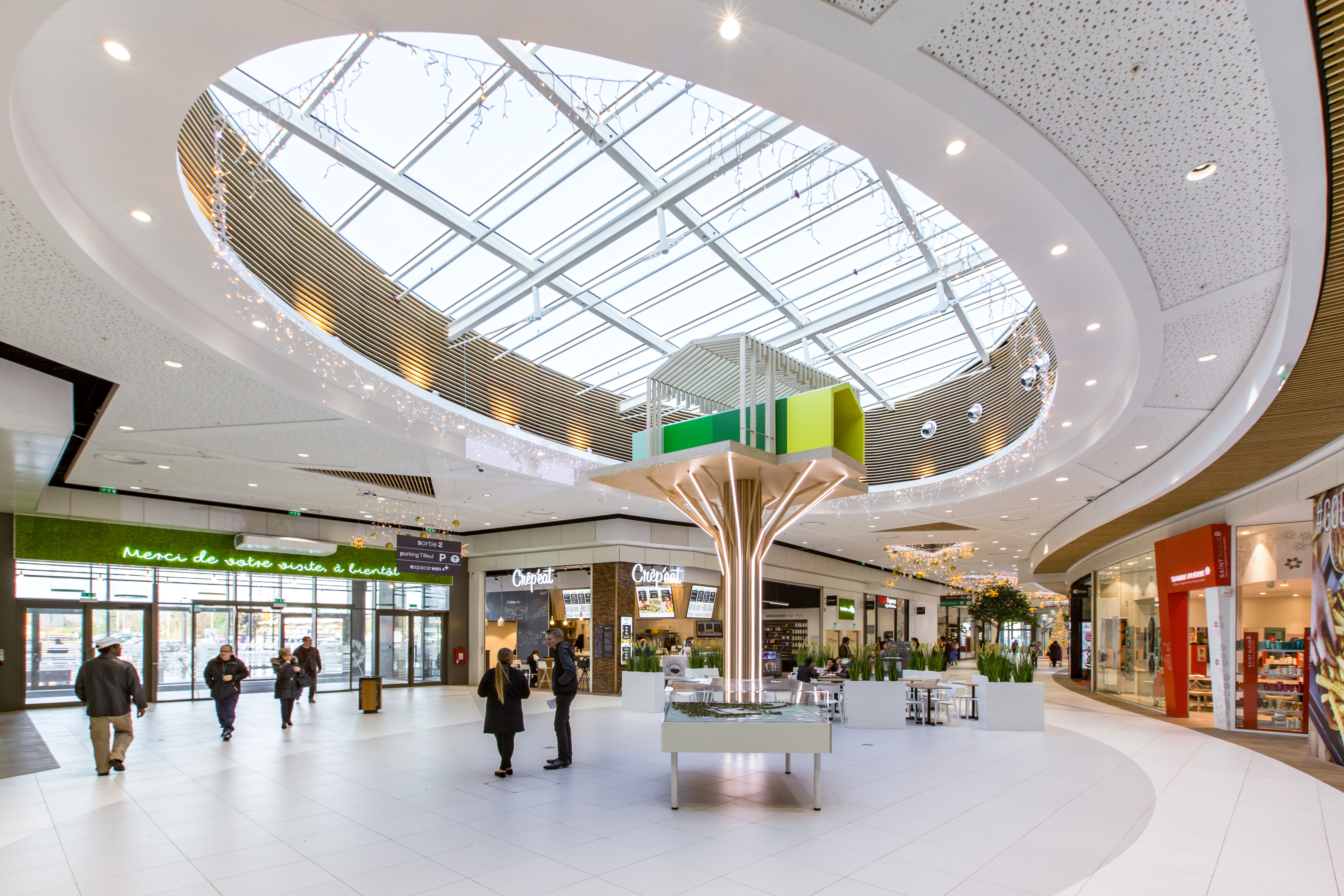 photo du centre commercial carrefour evreux de l'intérieur, après les travaux